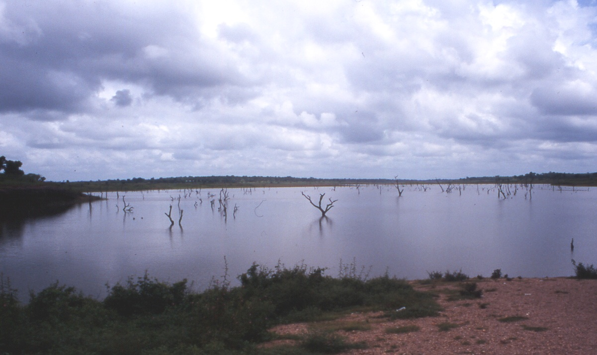 Ufer des Volta-Stausee